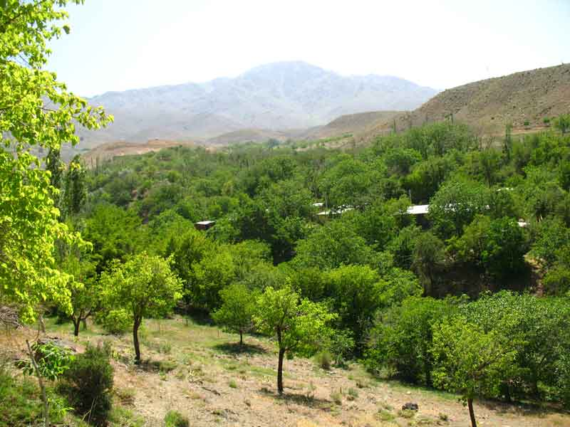 سرمشک